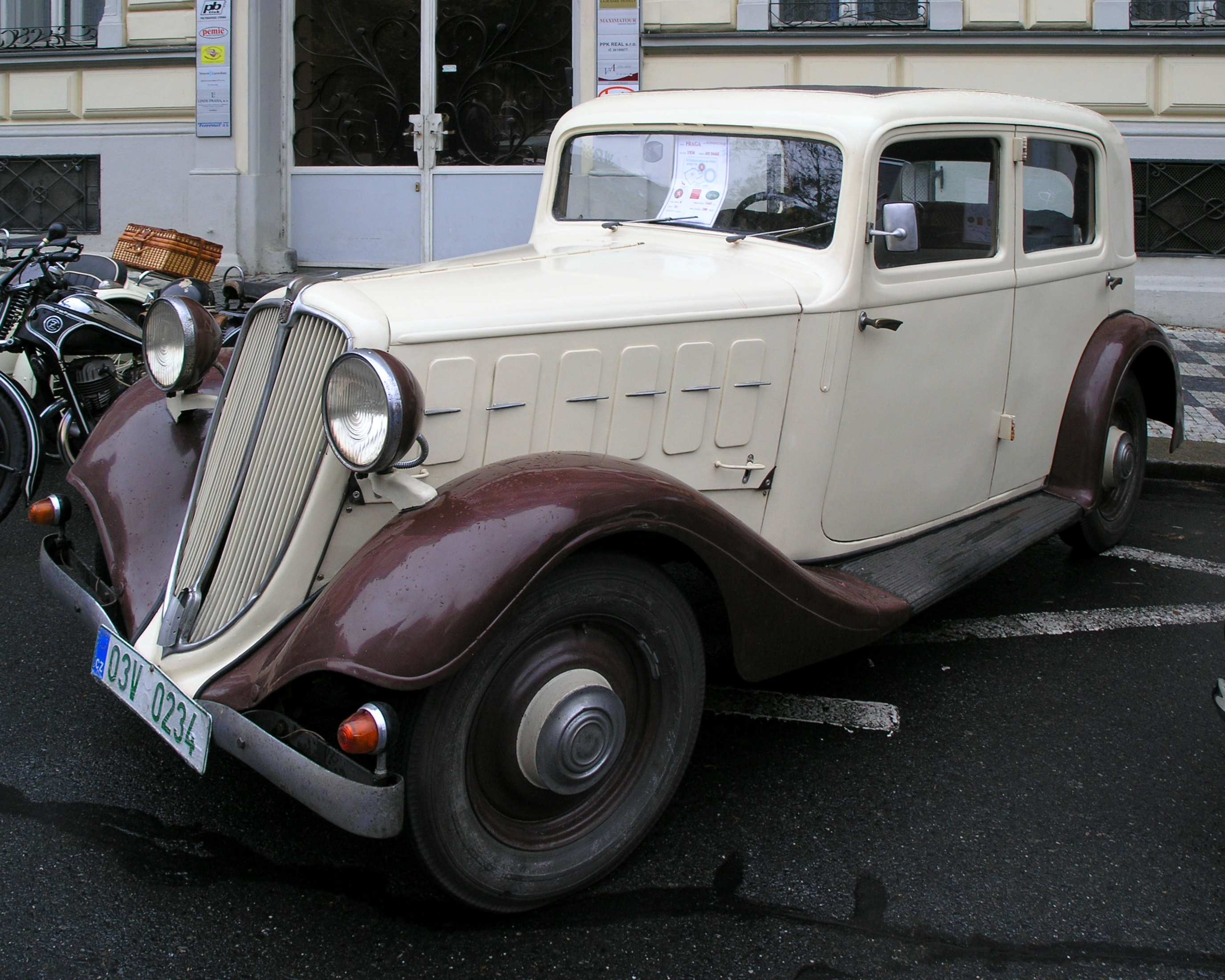 Vůz Praga Super Piccolo (1934) účastnící se jízdy veteránů u příležitosti 90. výročí vzniku samostatného Československa, 28. října 2008